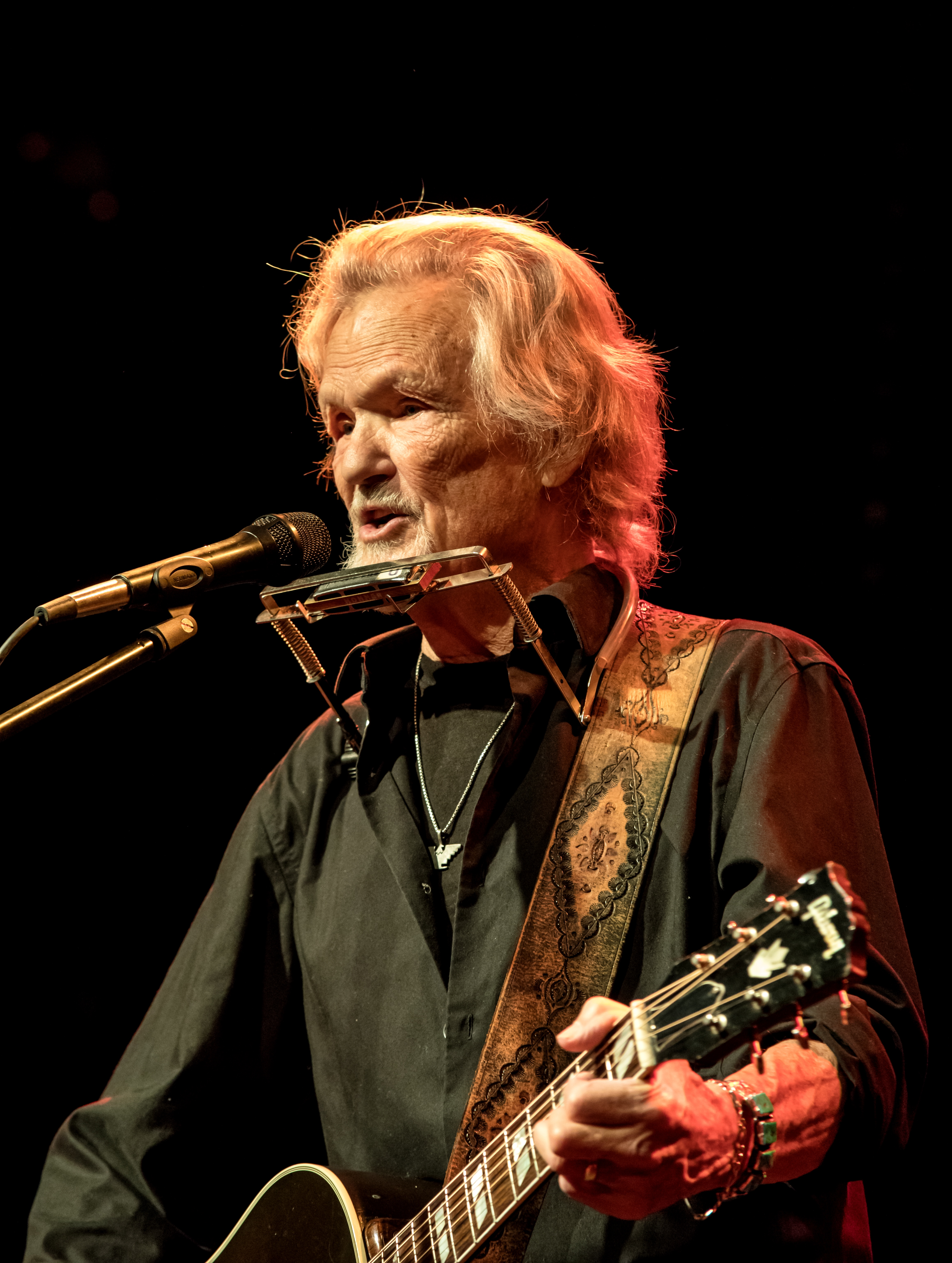 Bilder vom Zelt Musik Festival 2017 in Freiburg im Breisgau Kris Kristofferson